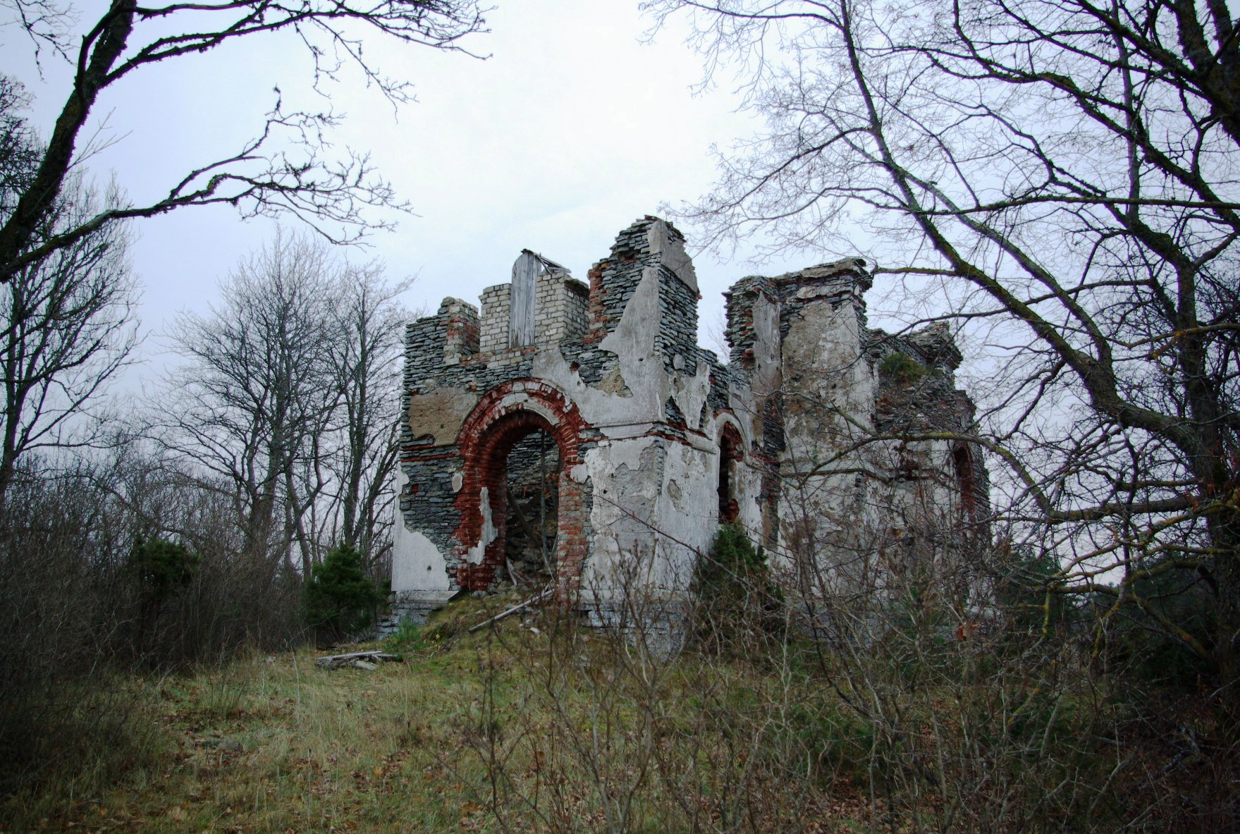 Torgu Apostel Johannese kirik, vaade edelast